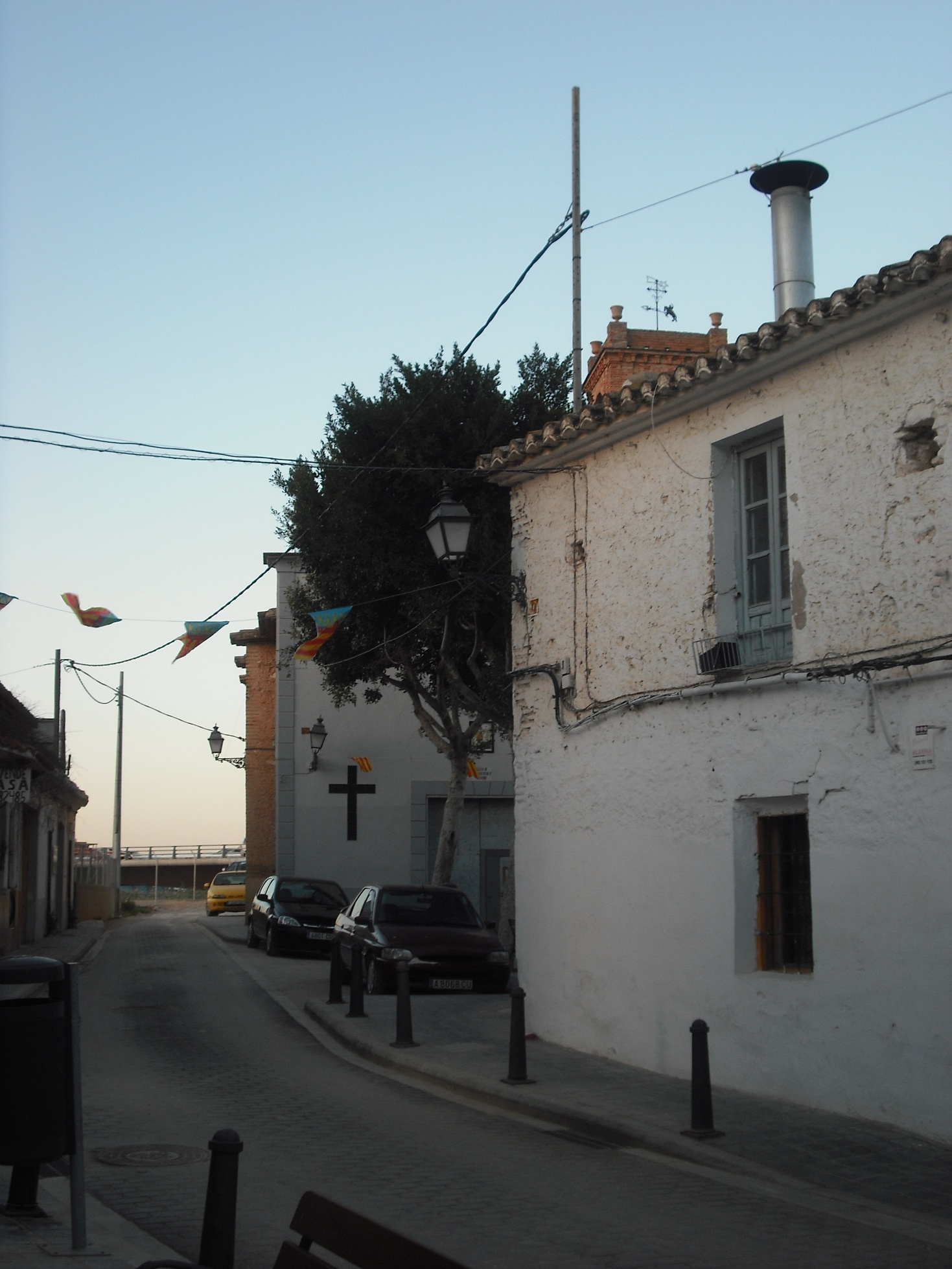 Església de Sant Jaume de Beniferri.